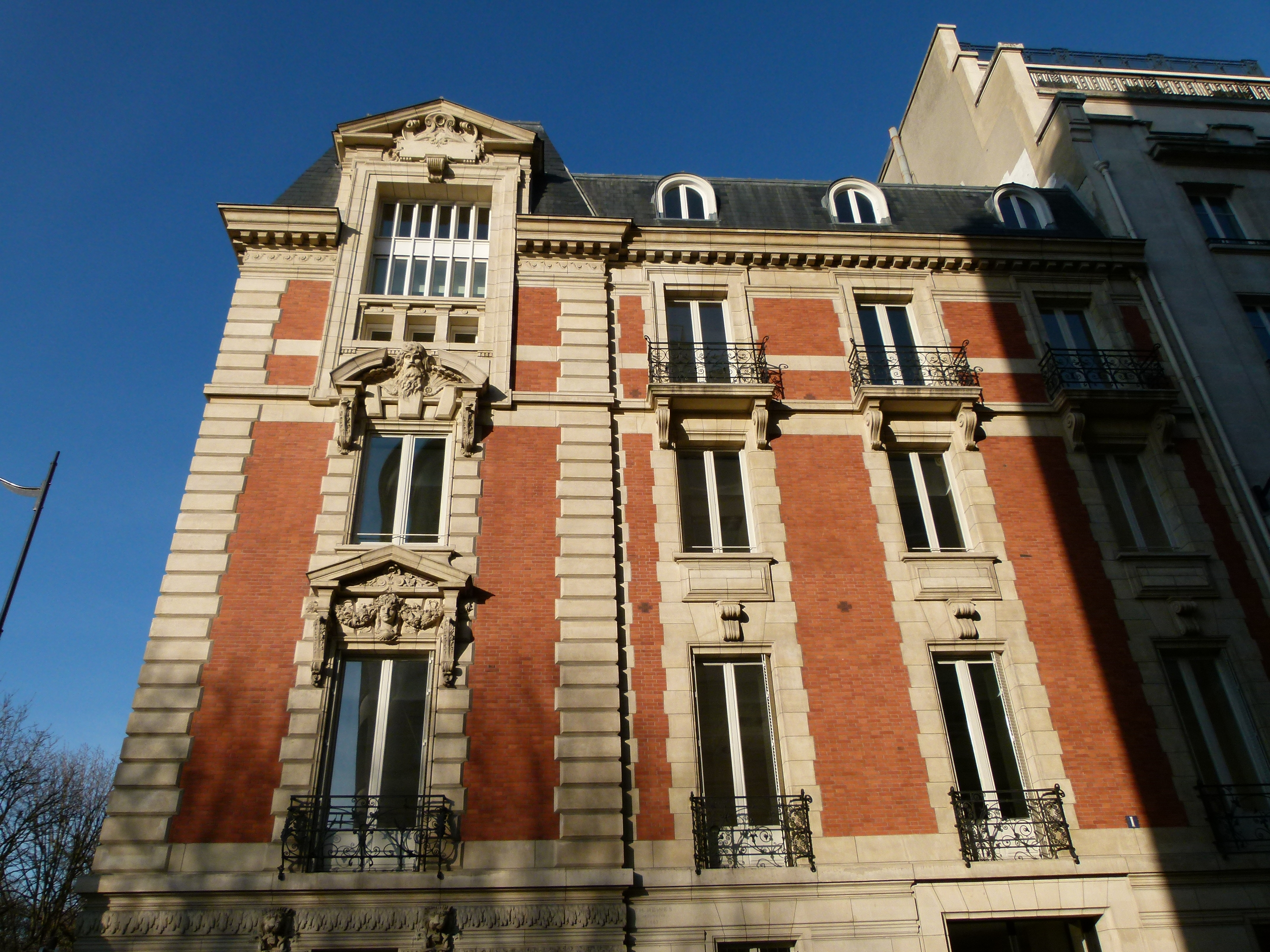 Façade d'immeuble rue François 1er, Paris